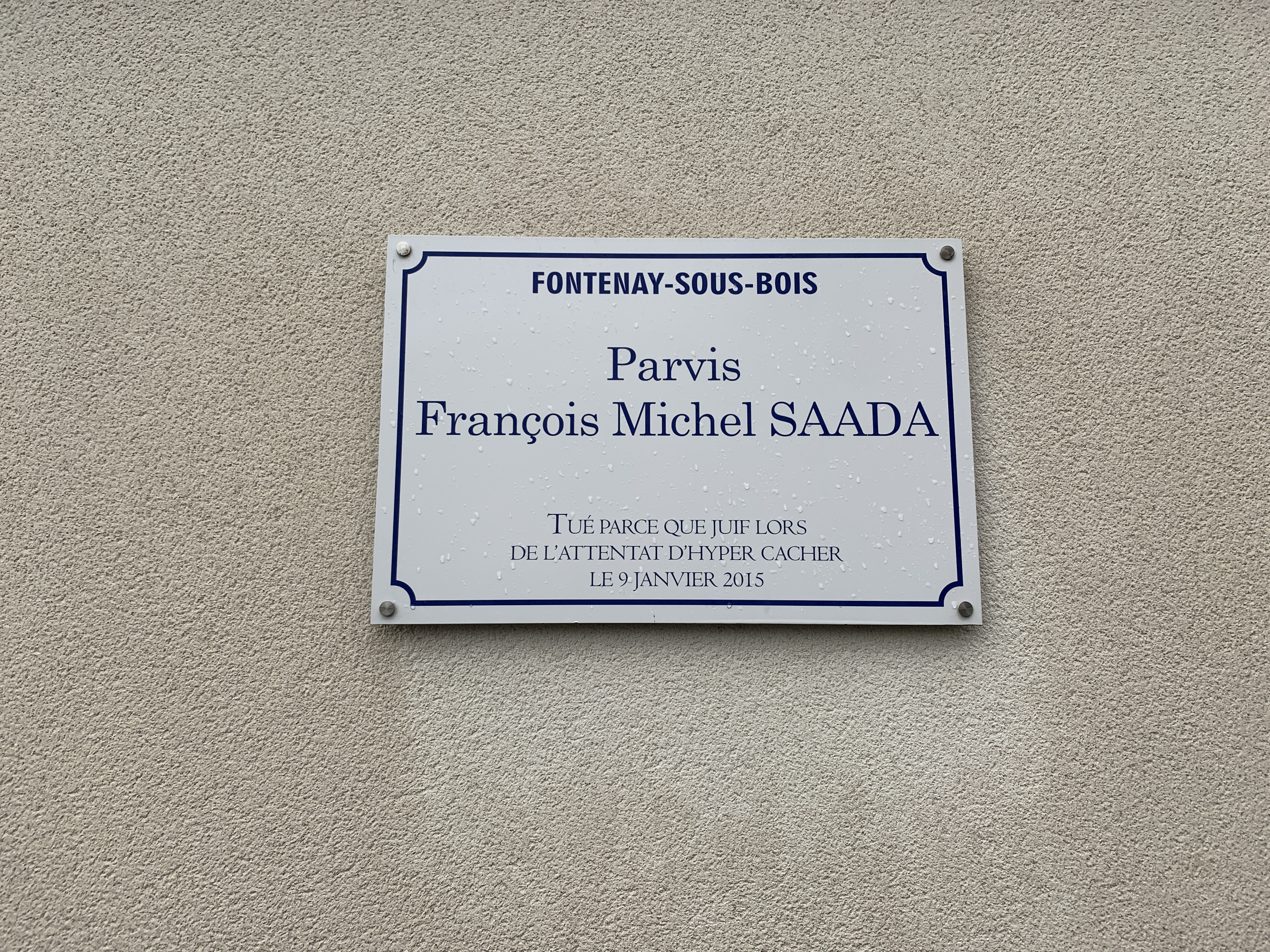 Plaque du parvis François Michel Saada, Fontenay-sous-Bois.